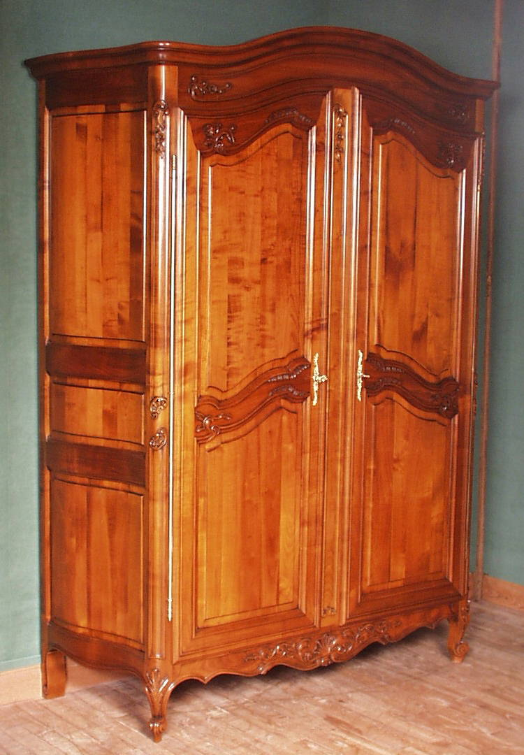 Armoire "Chantilly" de style Louis XV, réalisé par les Ateliers Allot Frères.